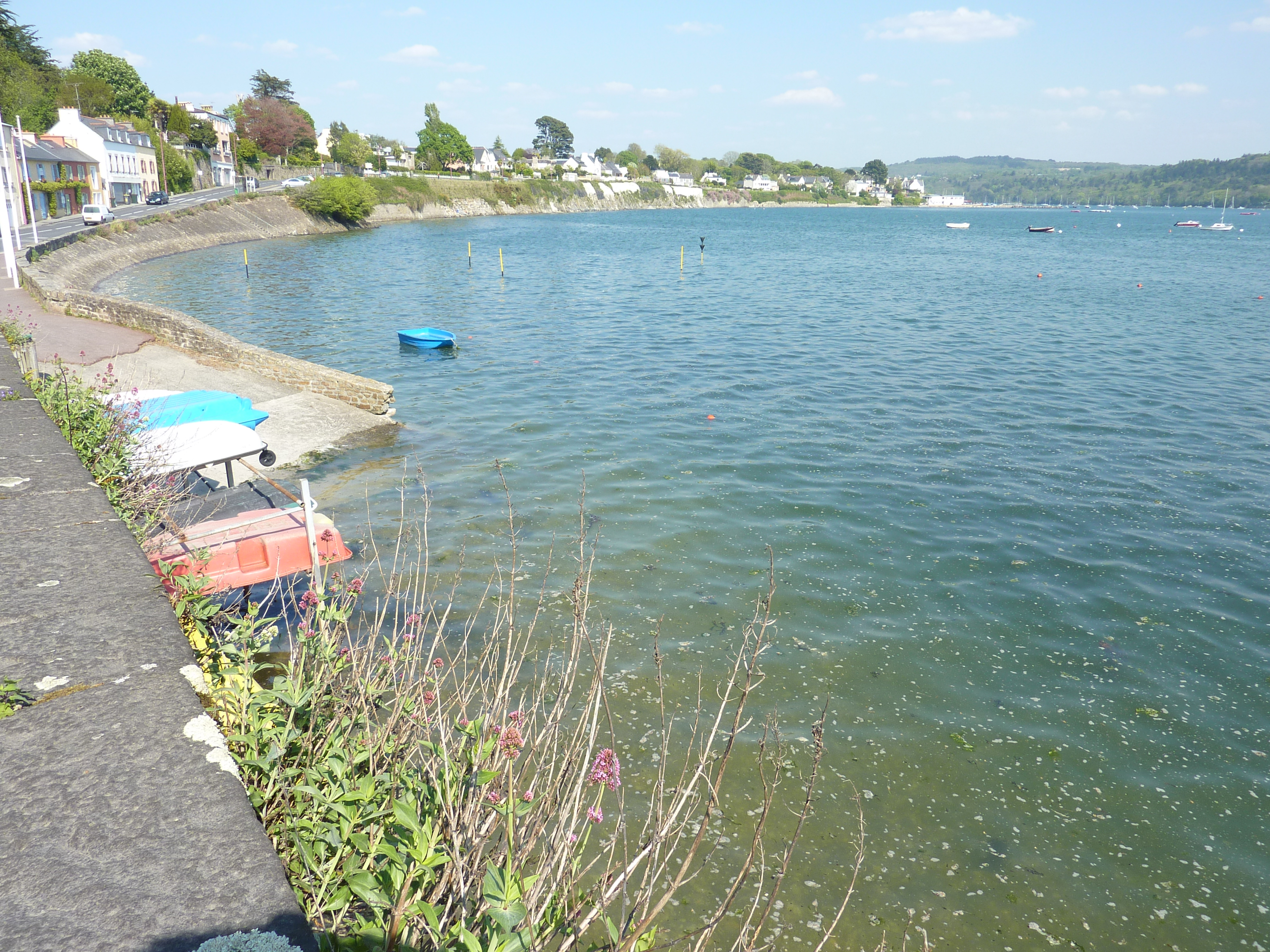 Le Relecq-Kerhuon : l'Anse de Camfrout